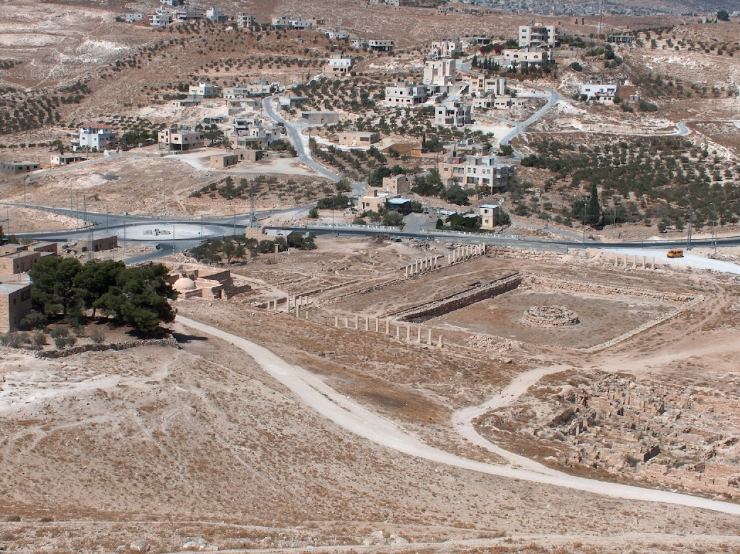 פנים הארמון בפסגת הhe:הרודיון 10/06 צילום:מיכאלי 23:14, 10 באוקטובר 2006 (IST)